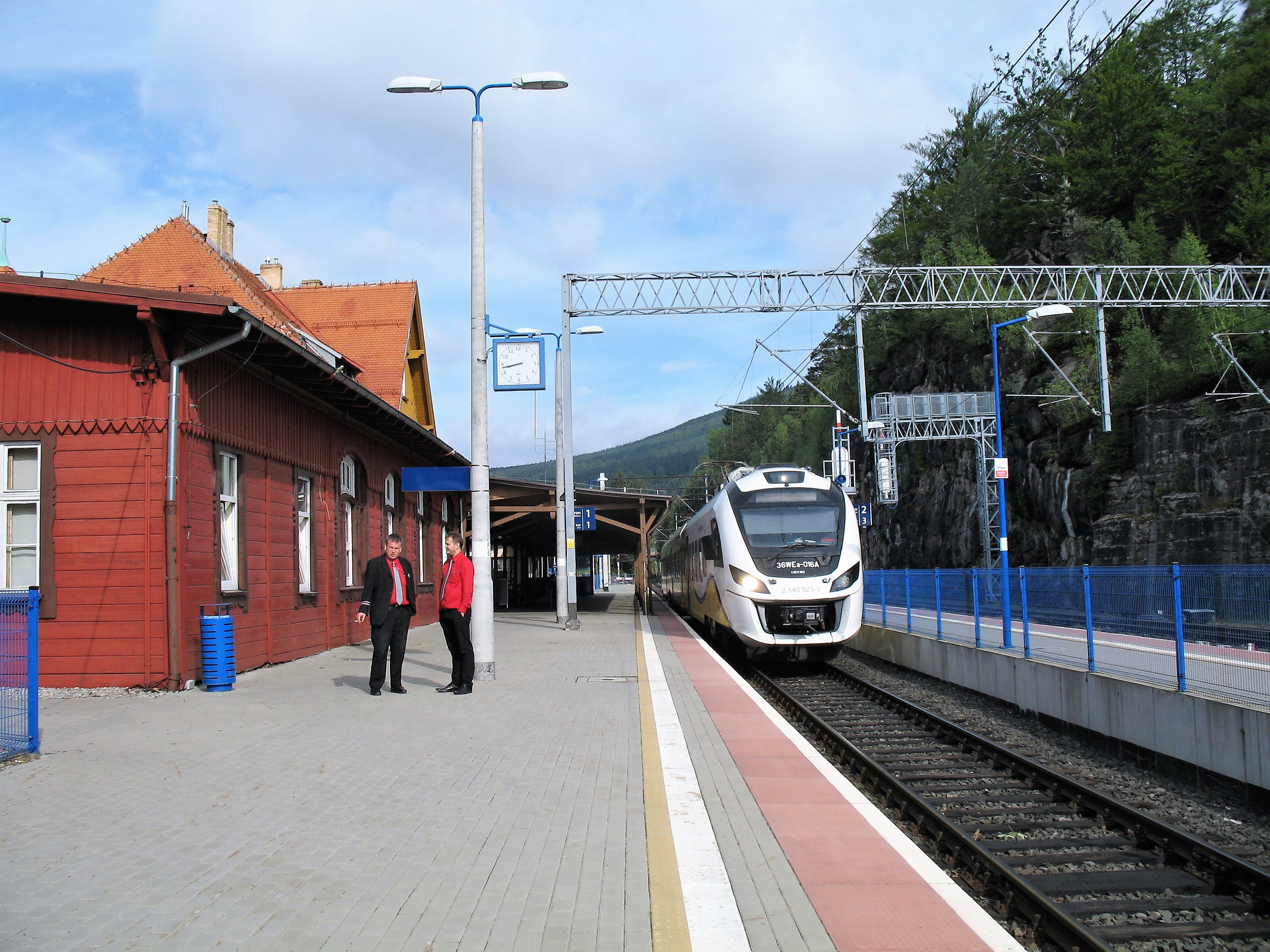 Szklarska Poręba Górna. Před odjezdem osobního vlaku společnosti Koleje Dolnośląskie do Jelení Góry